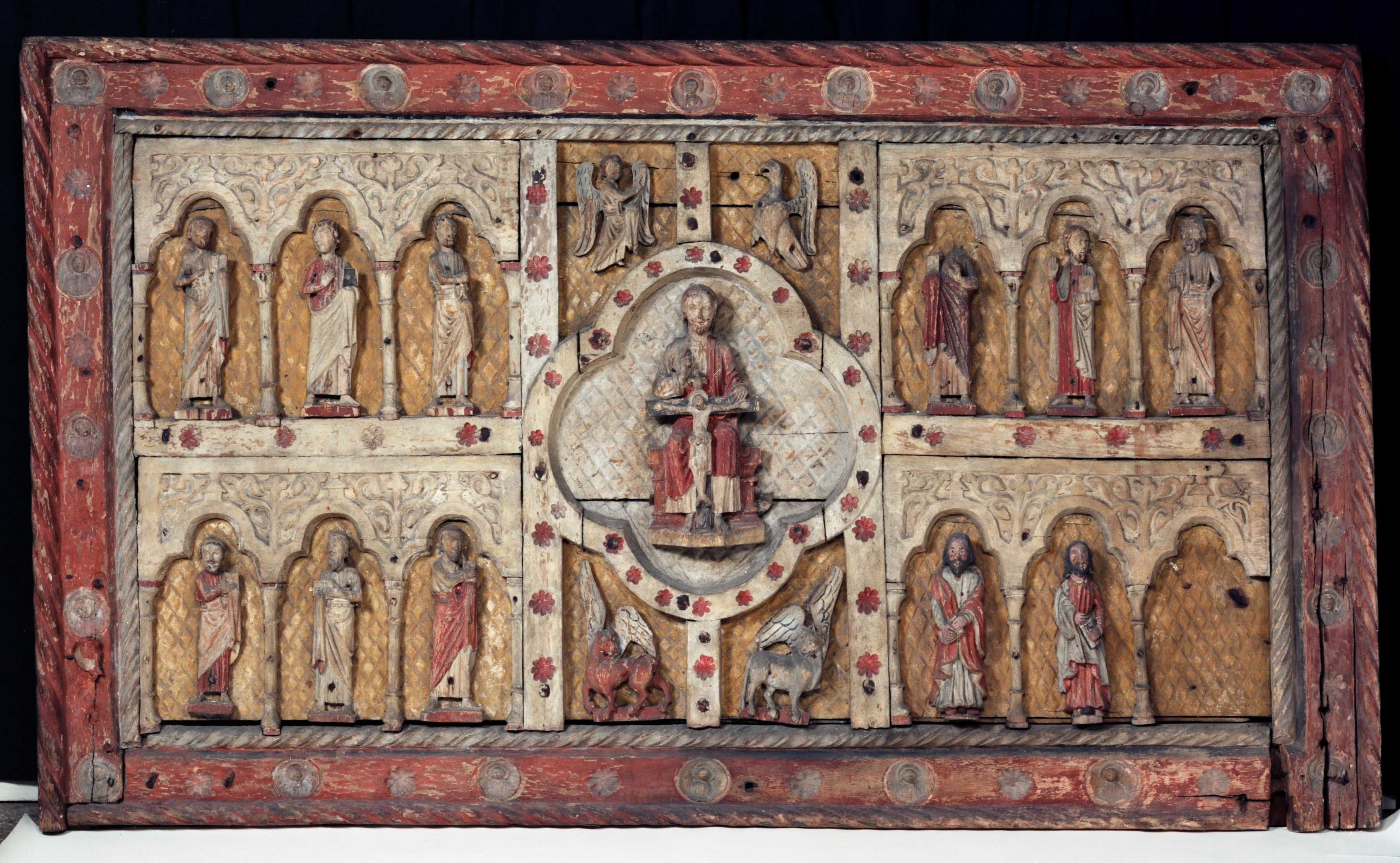 Antemensale fra Komnes i Oldsaksamlingen. Bilde fra Unimus (jf. søk).